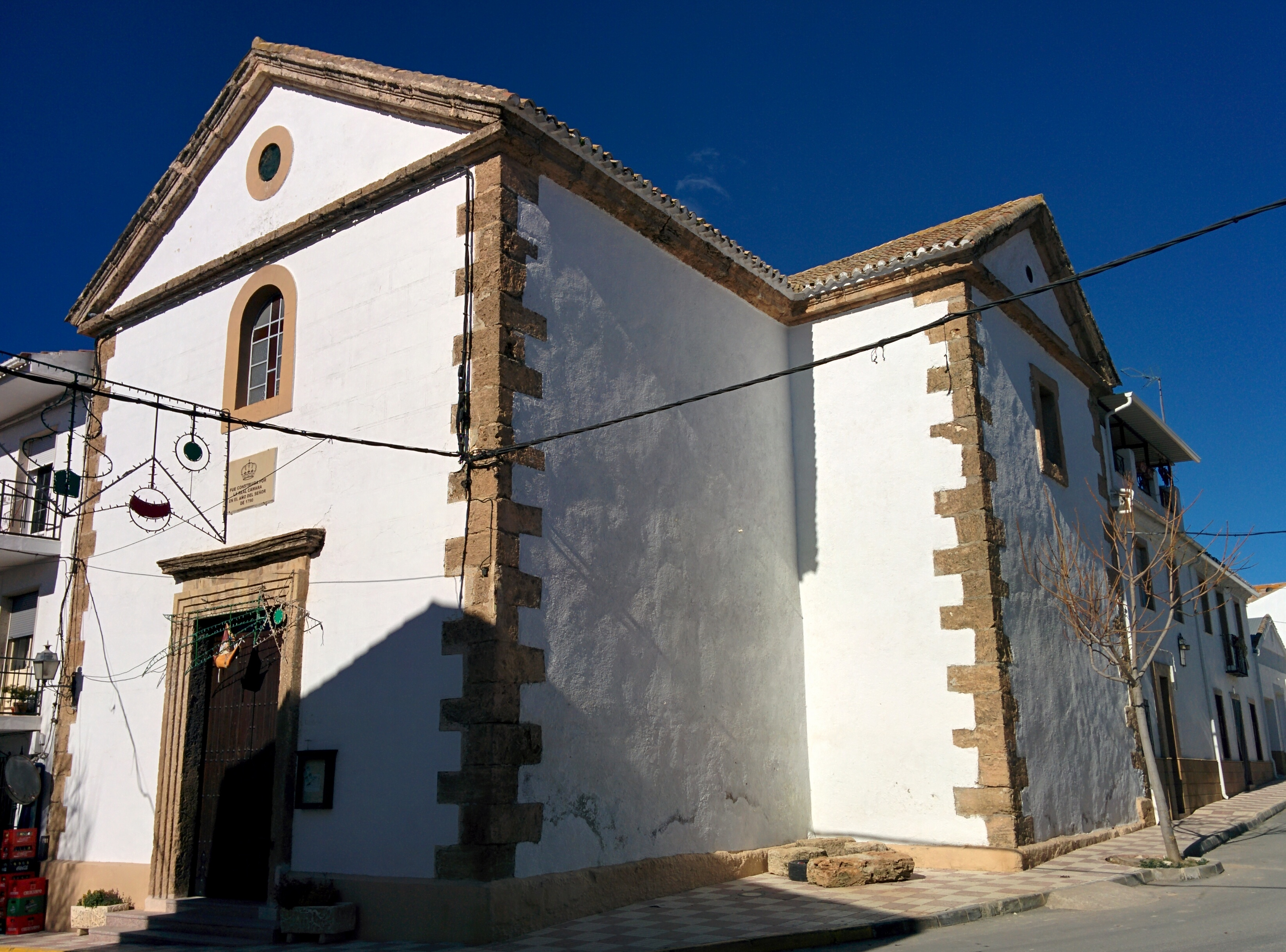 Iglesia de Santa Ana, en Montillana (Granada, España).